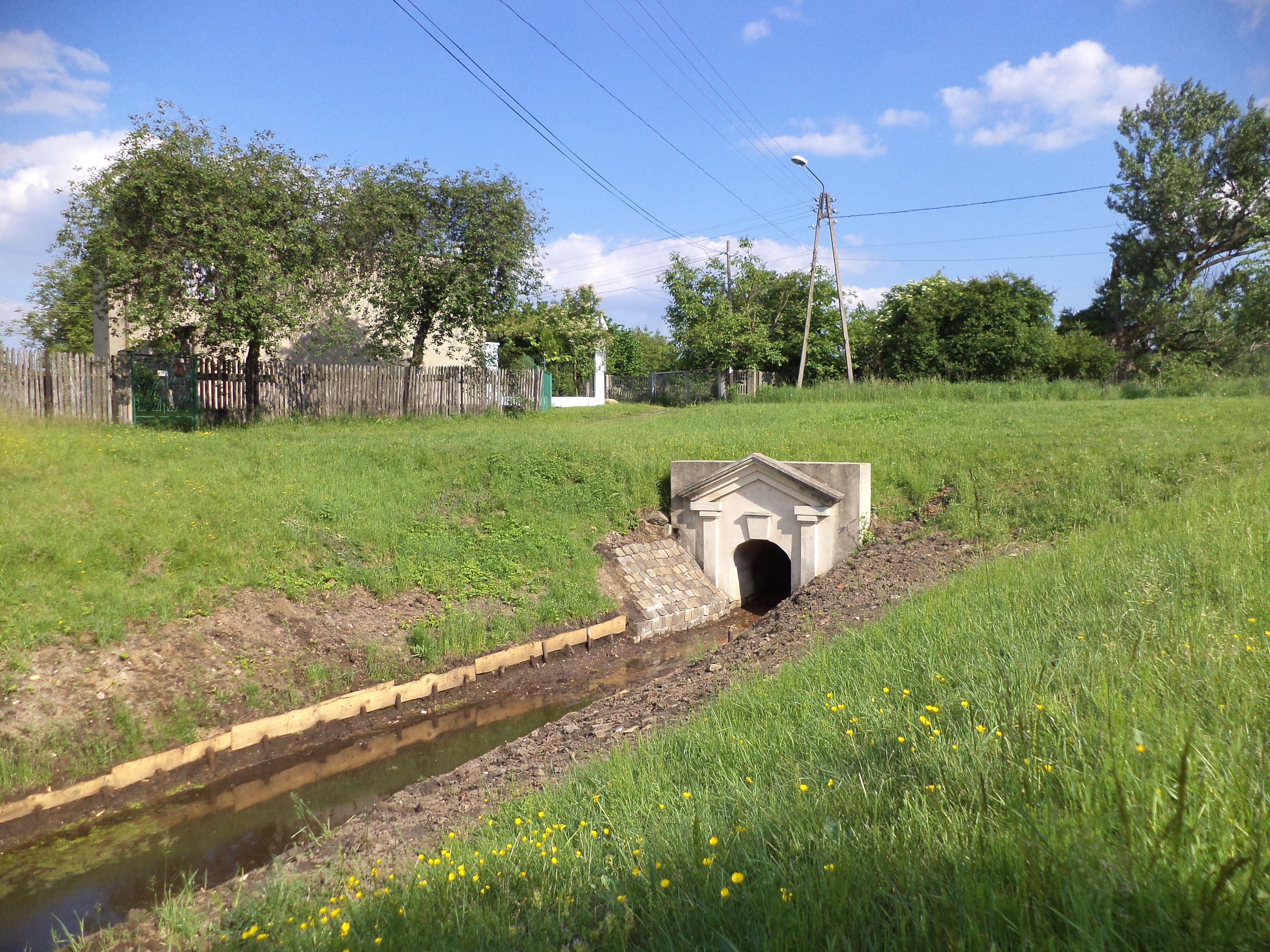 Wylot i roznos sztolni "Boże Wpomóż" ("Gotthelf") w Tarnowskich Górach-Strzybnicy